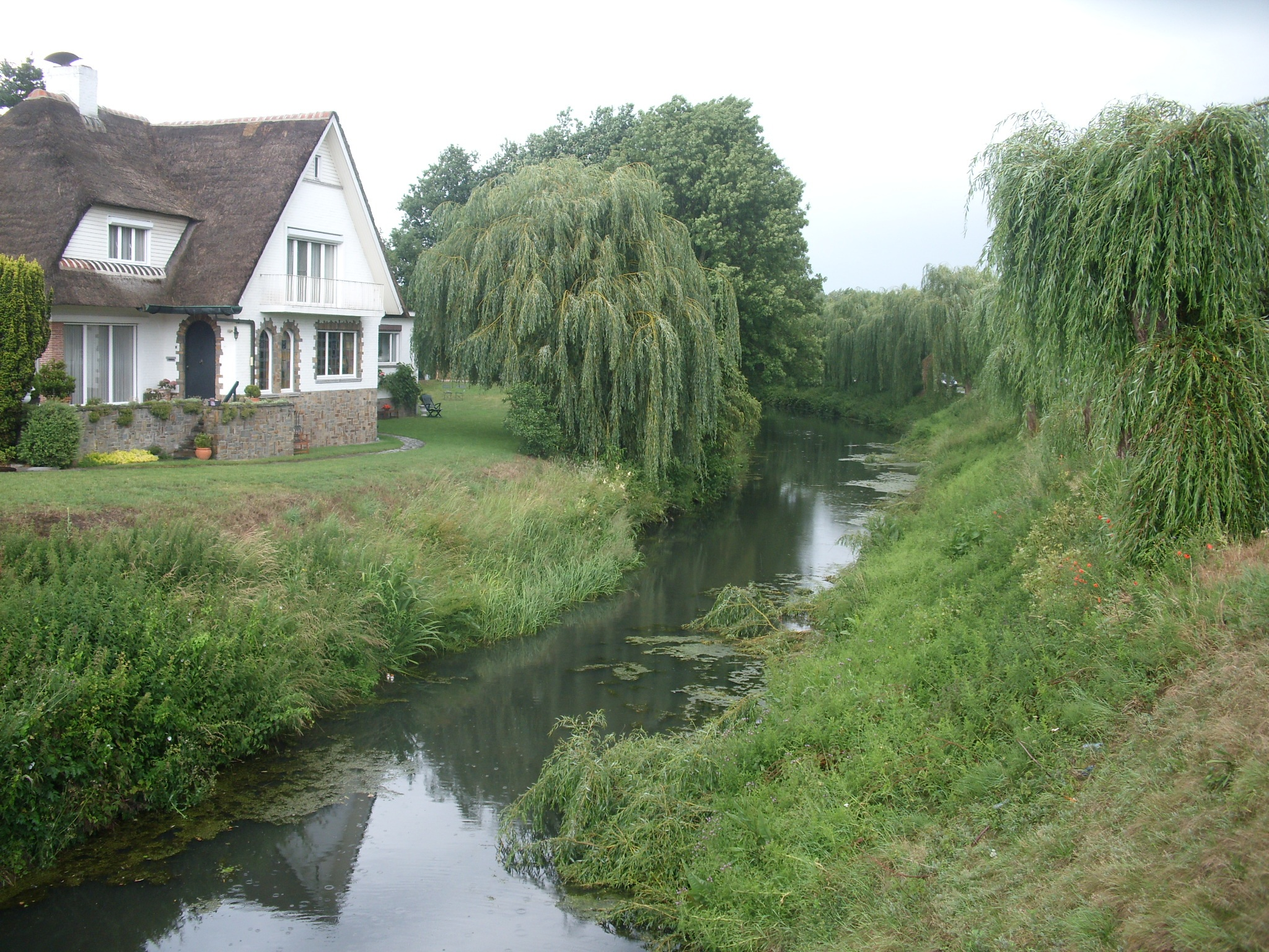 De Langelede - vanop de brug in de Walderdonkstraat - Wachtebeke - Oost-Vlaanderen - België